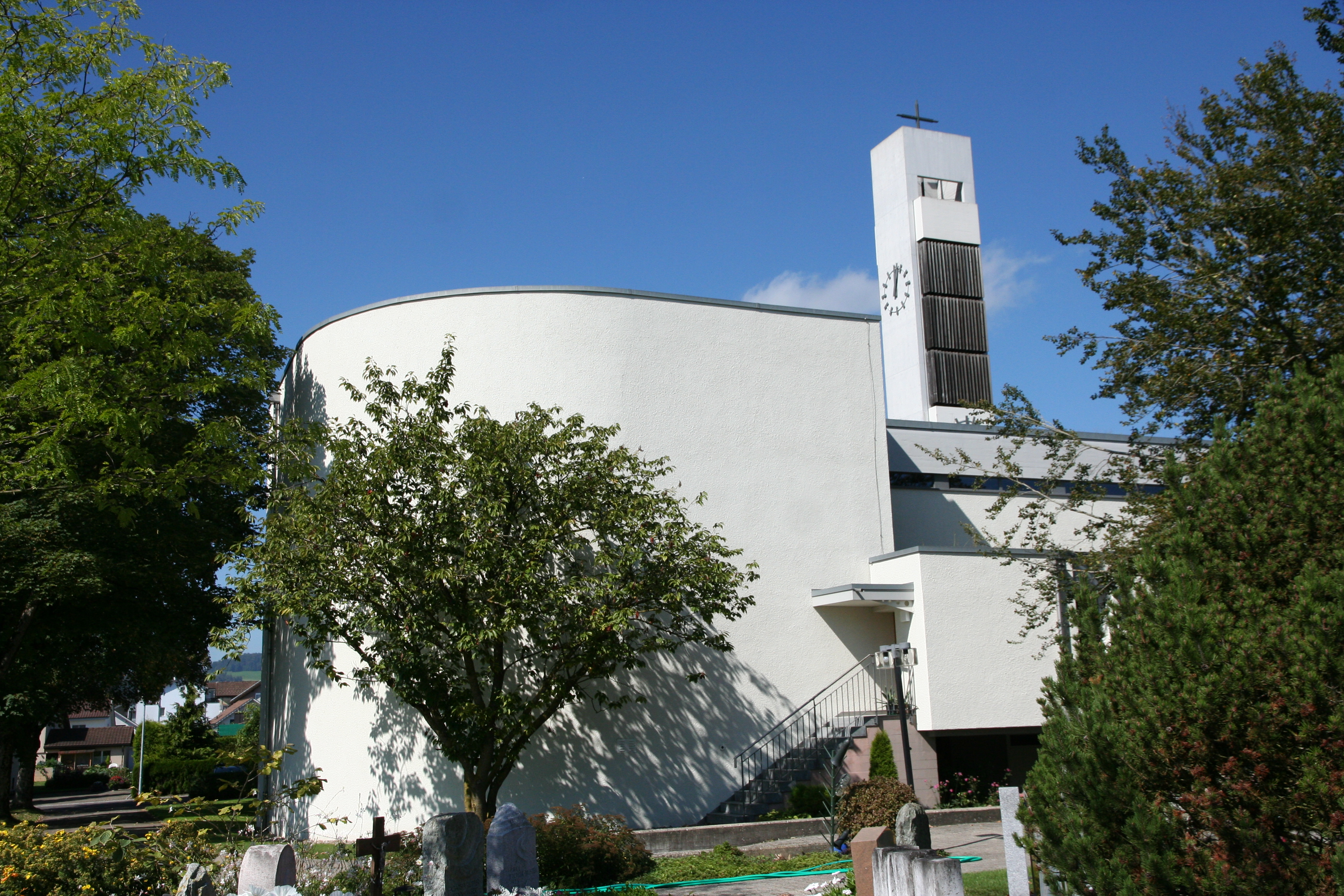 röm.-kath. Pfarrkirche Eschlikon TG